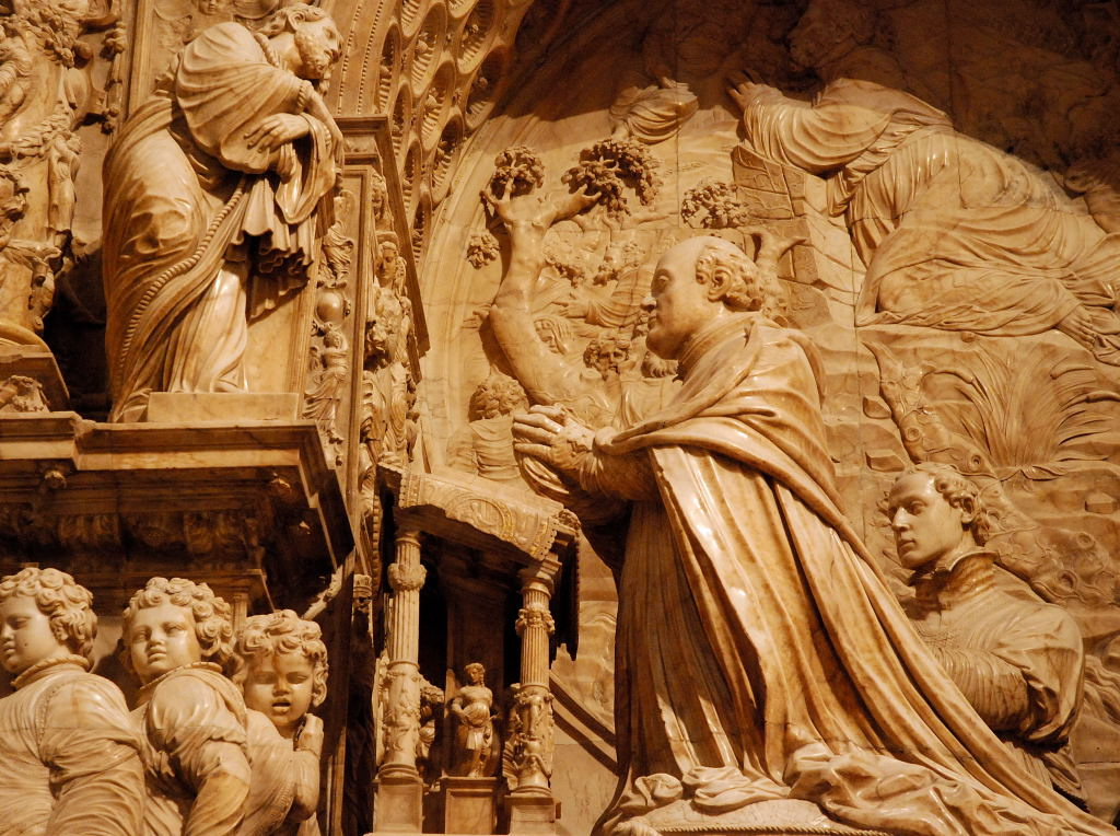 Cenotafio del Obispo de Plasencia Gutierre de Vargas Carvajal (Capilla del Obispo, Madrid), obra en alabastro del sigl. XVII de Francisco Giralte / Cénotaphe de l´évêque de Plasencia Gutierre de Vargas Carvajal (Capilla del Obispo, Madrid), oeuvre en albâtre du XVIIè siècle de Francisco Giralte